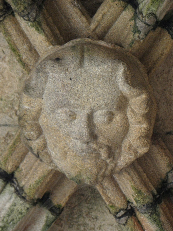 Clef de voûte du porche septentrional de la chapelle N.D. du Kreisker à Saint-Pol-de-Léon (29).